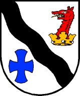 Gemeinde Schwarzach im Pongau: In Silber ein schwarzer Schrägrechtsfluß, der oben von einer goldenen Krone, aus der ein roter Drachenkopf wächst, und unten von einem blauen Benediktuskreuz begleitet ist